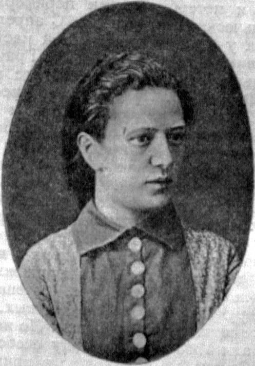 Гринберг Христина Григорьевна - русская революционерка, член партии "Народная воля"